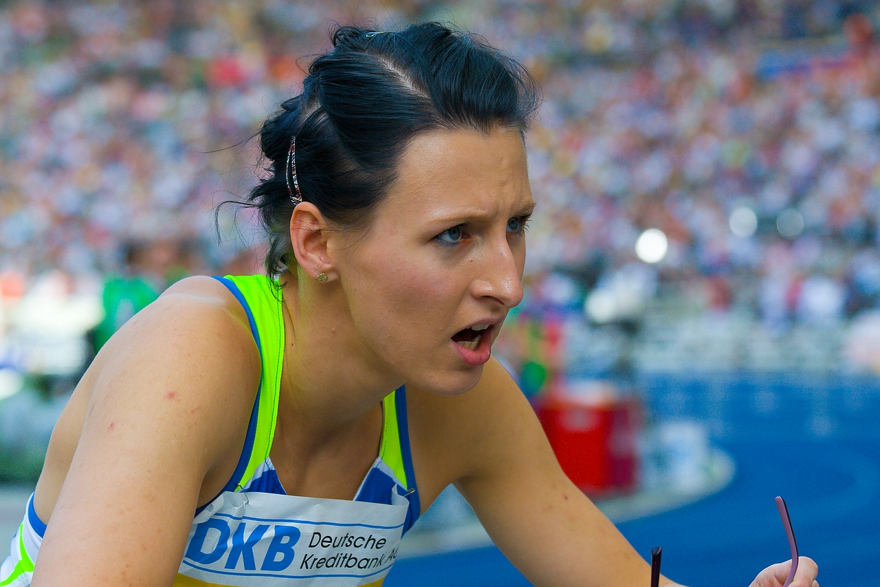 Ariane Friedrich al Meeting Istaf di Berlino in una data della "Golden League" del 2008